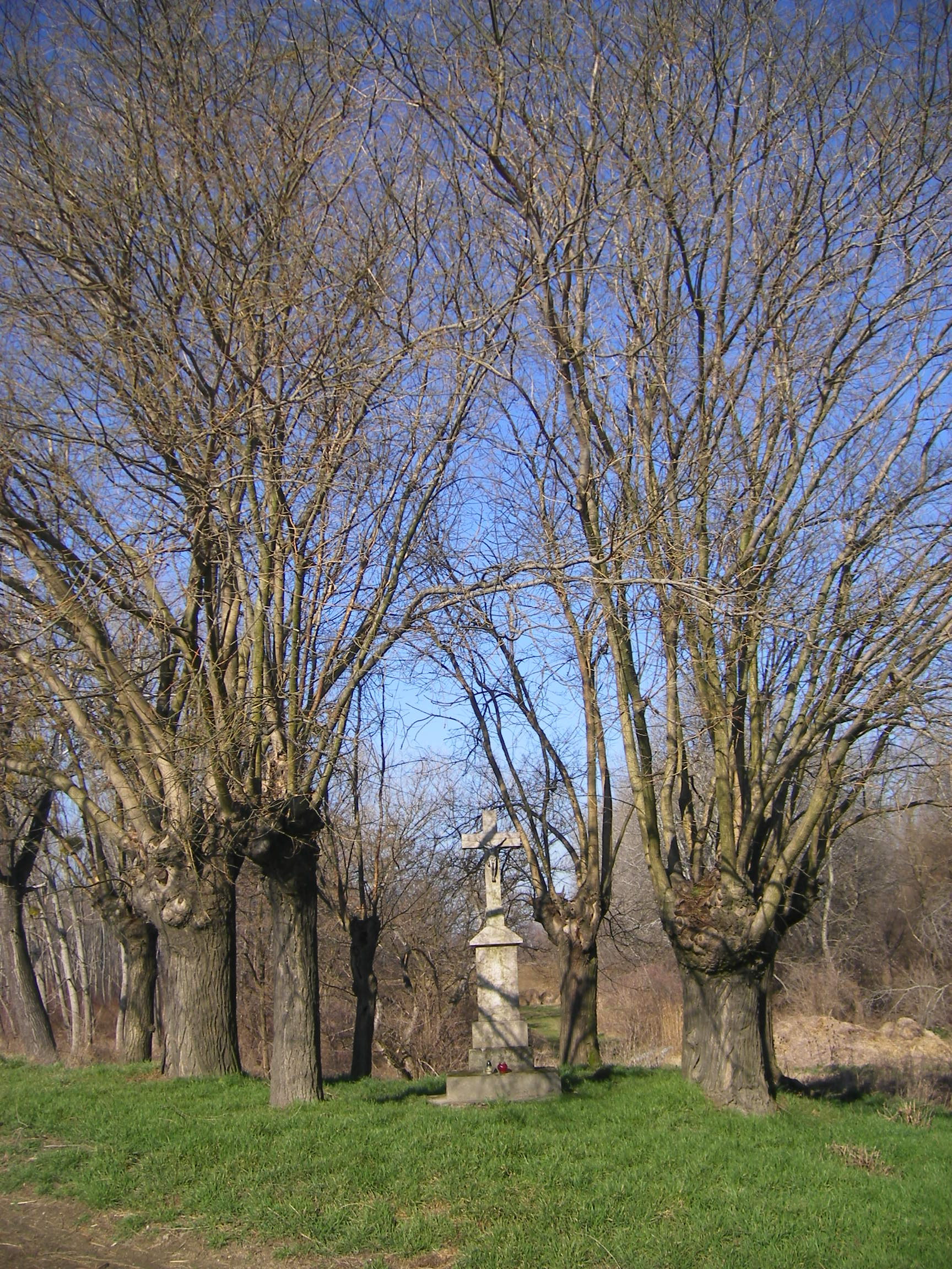 Kameničná - Keszegfalva, okres Komárno